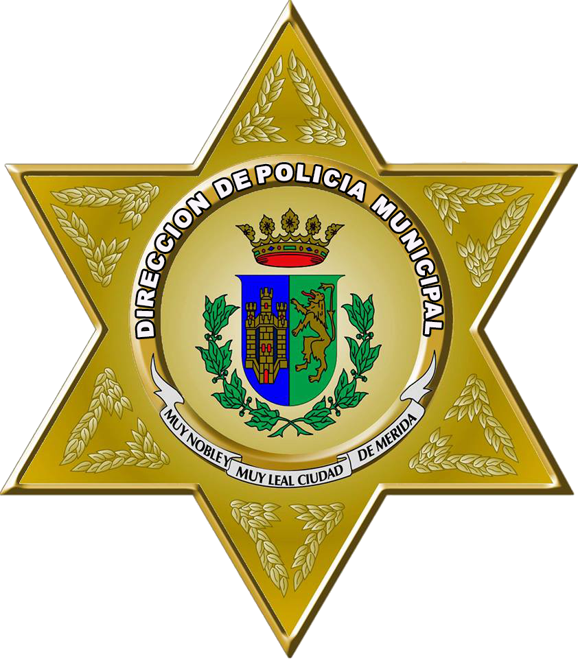 Logo de la Policía Municipal de Mérida